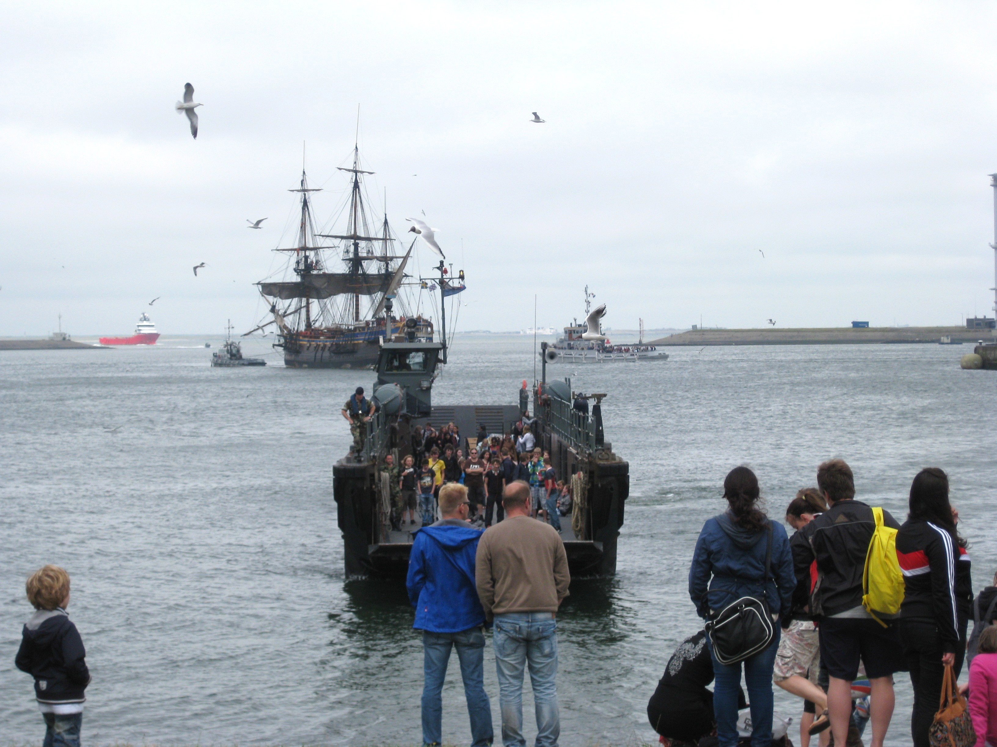 Demonstratie landingsvaartuig op de Marinedagen 2012 in Den Helder. Op de achtergrond het zeilschip Göhteborg (replica)